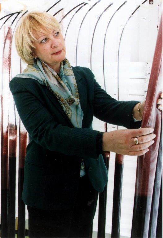 שוש ארד במעבדת האצות באוניברסיטת בן גוריון